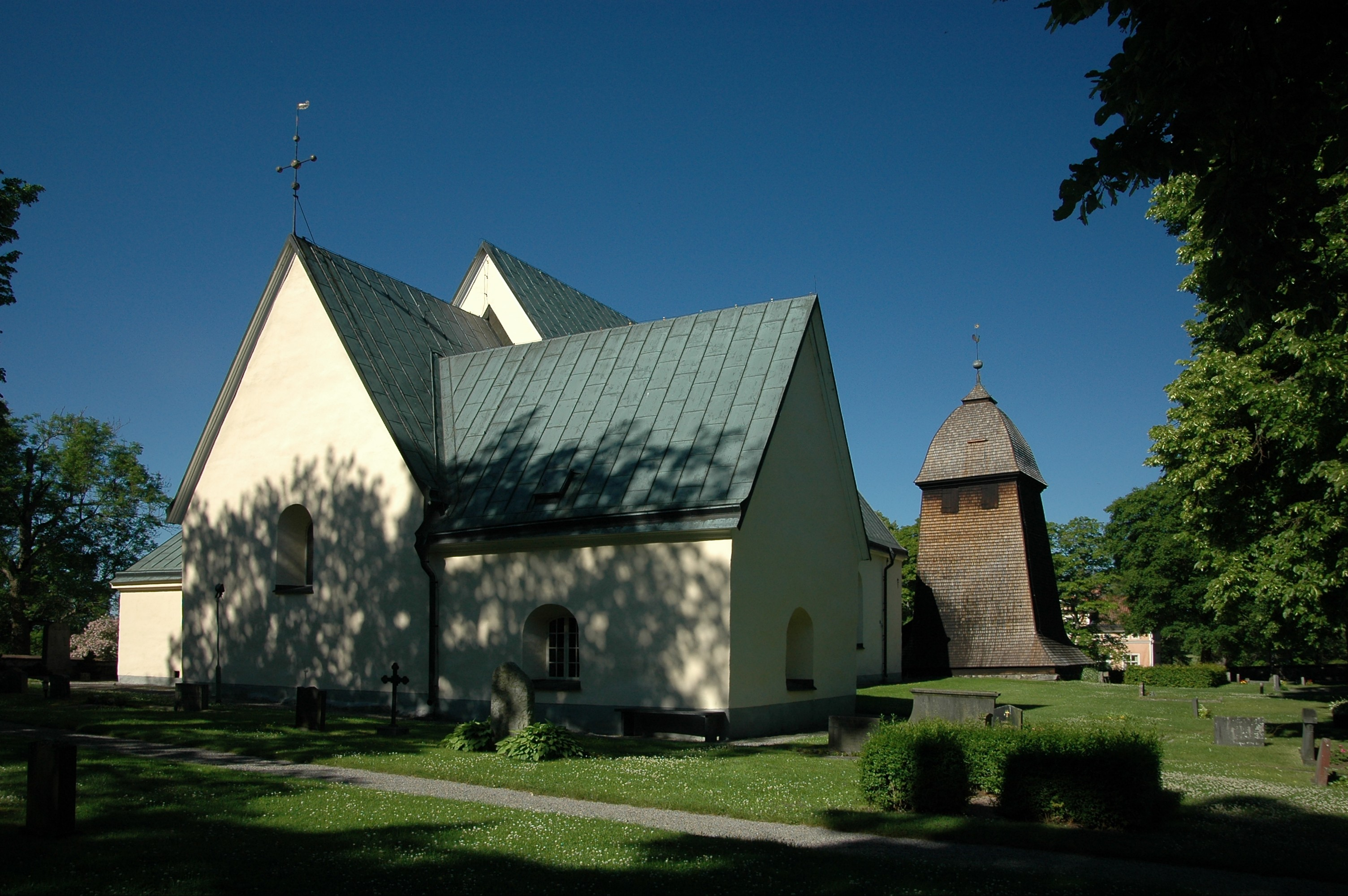 Badelunda kyrka, Västerås